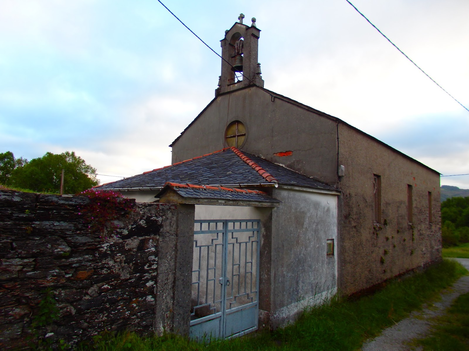 Igrexa de San Lourenzo da Degolada, Baleira.